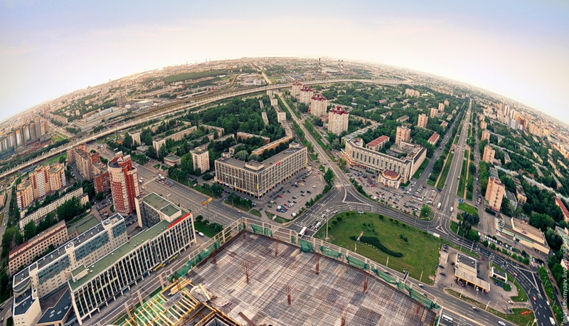 Вид на площадь Конституции со строящейся Лидер тауэр. Санкт-Петербург.